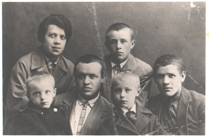 Аляксандр (Алесь) Адамовіч, беларускі савецкі палітычны дзеяч. Алесь Адамовіч з сям’ёй. Сядзіць у цэнтры ў першым радзе Алесь Адамовіч з сынамі Святаславам і Уладзімірам, справа брат Дзмітрый. Стаіць сястра Тацяна і брат Сяргей.